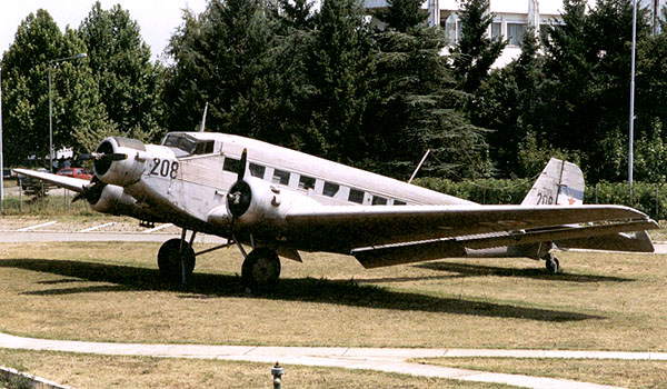 Јункерс Ју-52/3м - најбројнији немачки транспортни авион у Другом светском рату. Аутор фотографије је корисник Краљевић Марко.